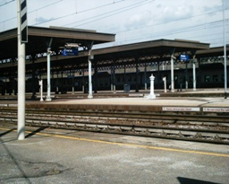 Pensiline della Stazione di Prato Centrale